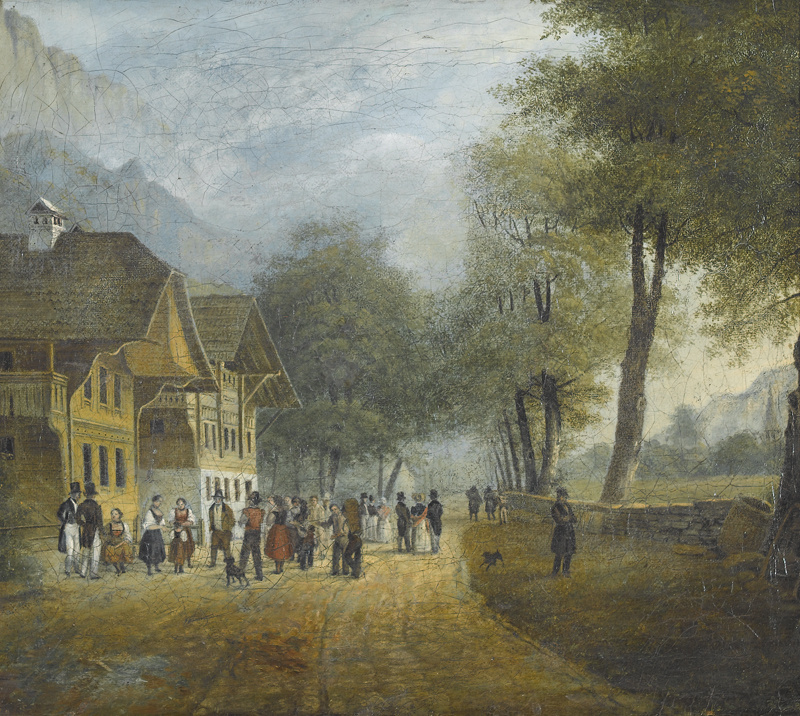 Höhenweg der Aarmühle nach Interlaken. Öl auf Leinwand, verso undeutlich signiert und datiert 1830; 31 x 36 cm. Wohl nach Vorlage der Lithographie "Höhenweg à Interlaken" (1823) von Jules-Louis-Frédéric Villeneuve (1796-1842).